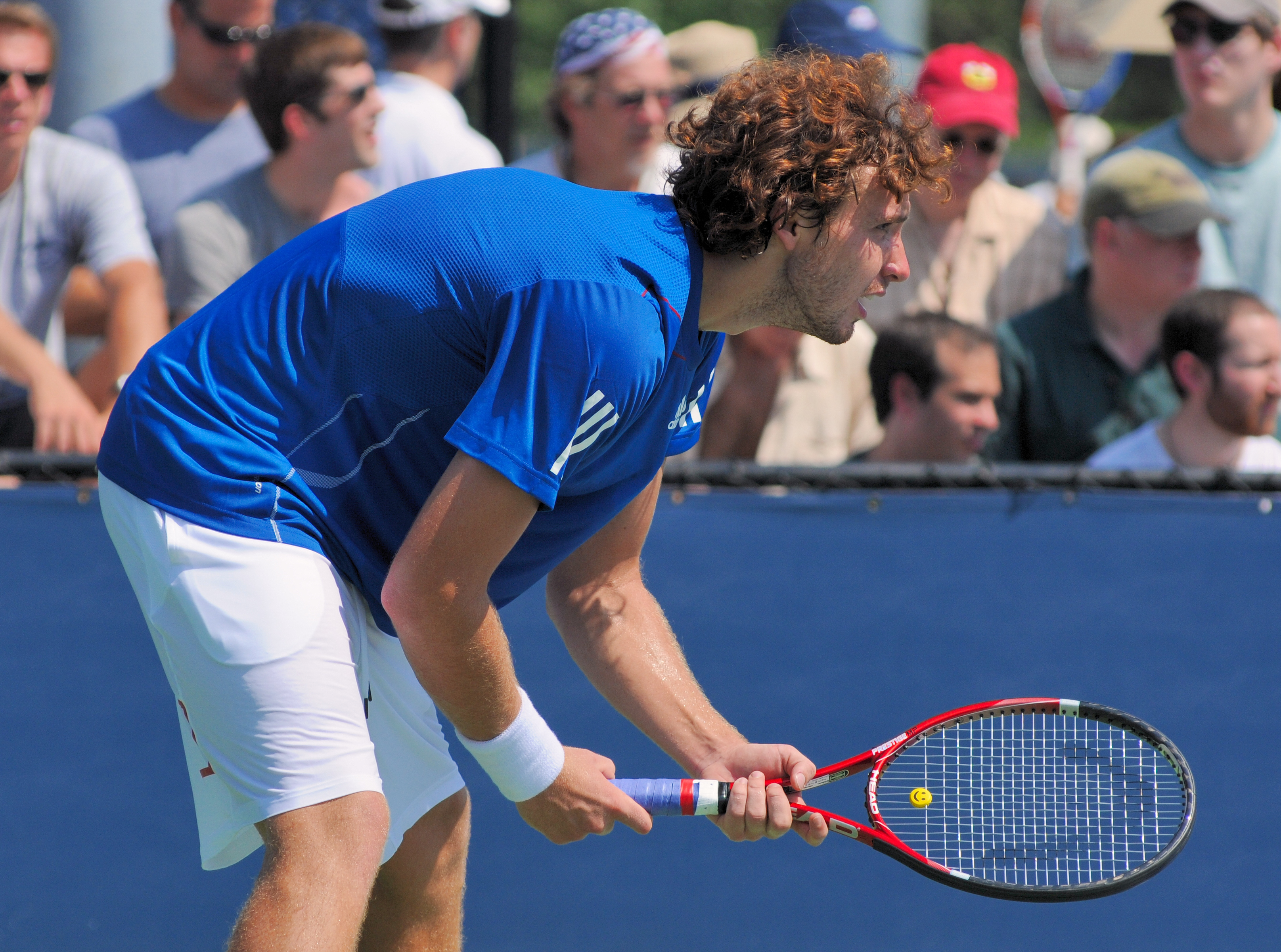 Ernests Gulbis - US Open 2010